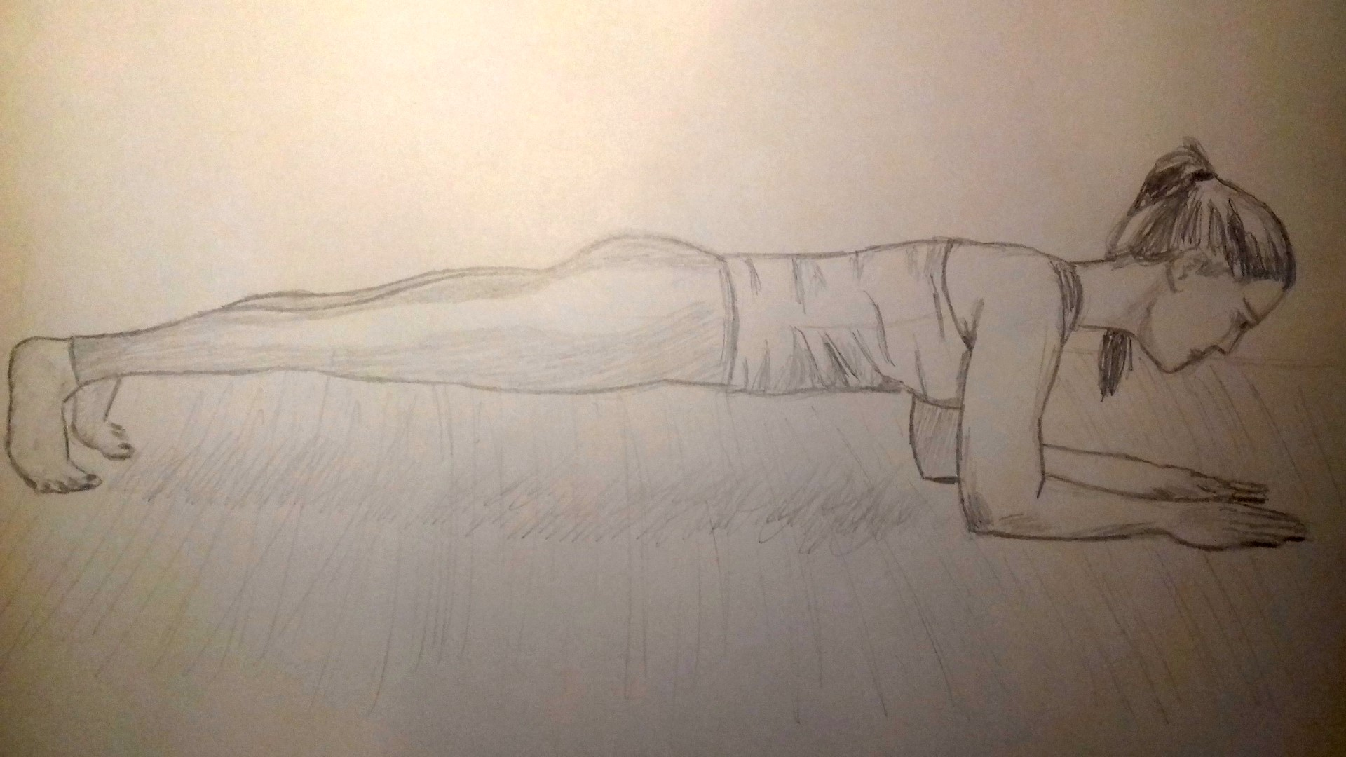 planche